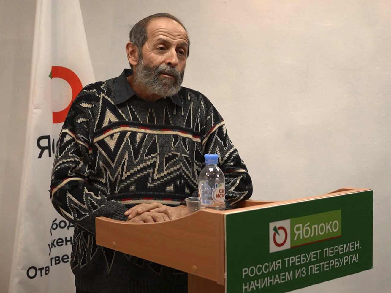 Борис Лазаревич Вишневский 1 декабря 2018 года на семинаре в офисе Петербургского Яблока